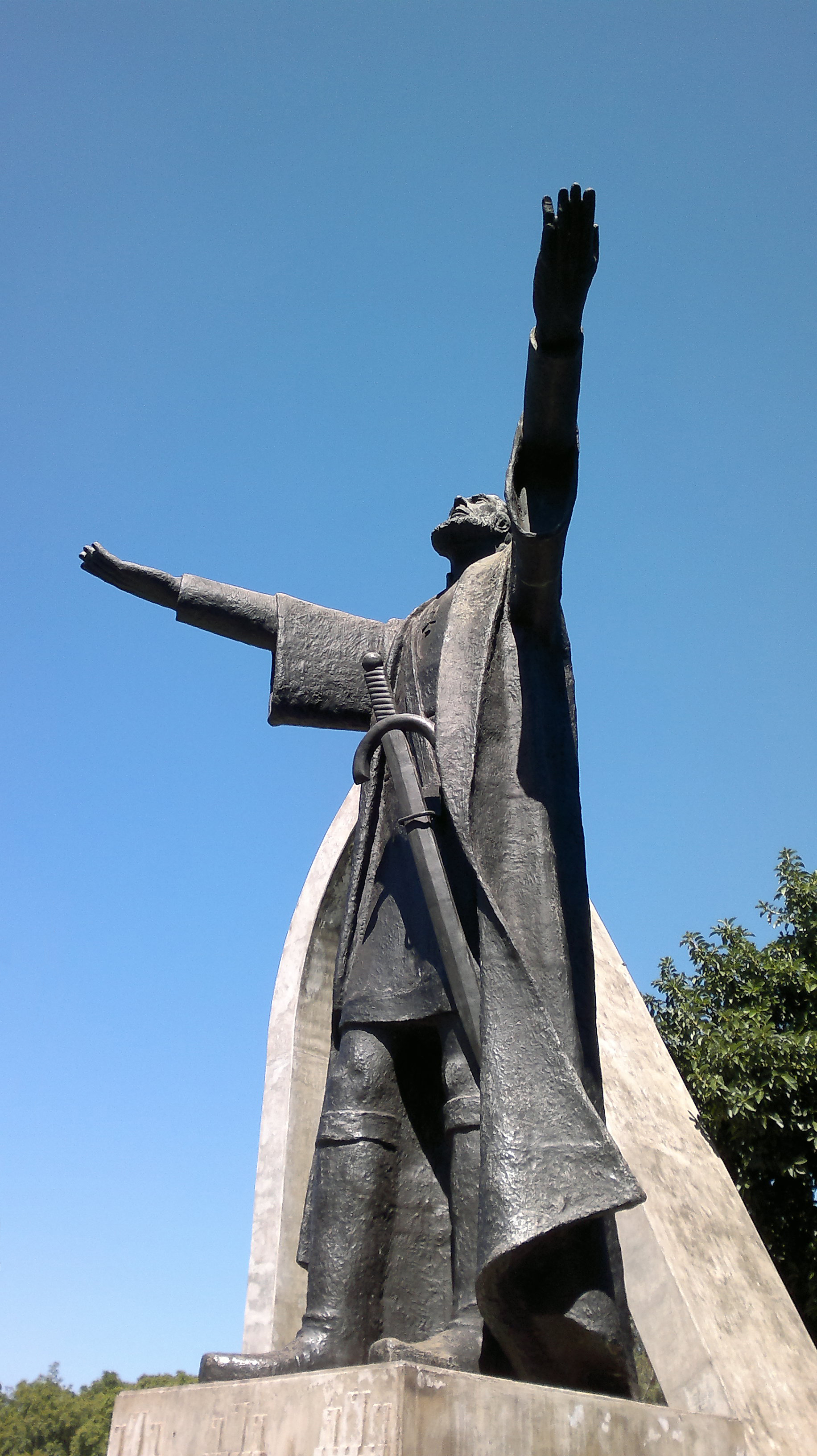 Escultura de Luiz Morrone, em bronze, inaugurada em 10 de julho 1988, por ocasião das comemorações dos 500 anos do descobrimento. Projeto do arquiteto Agostinho Vidal da Rocha.